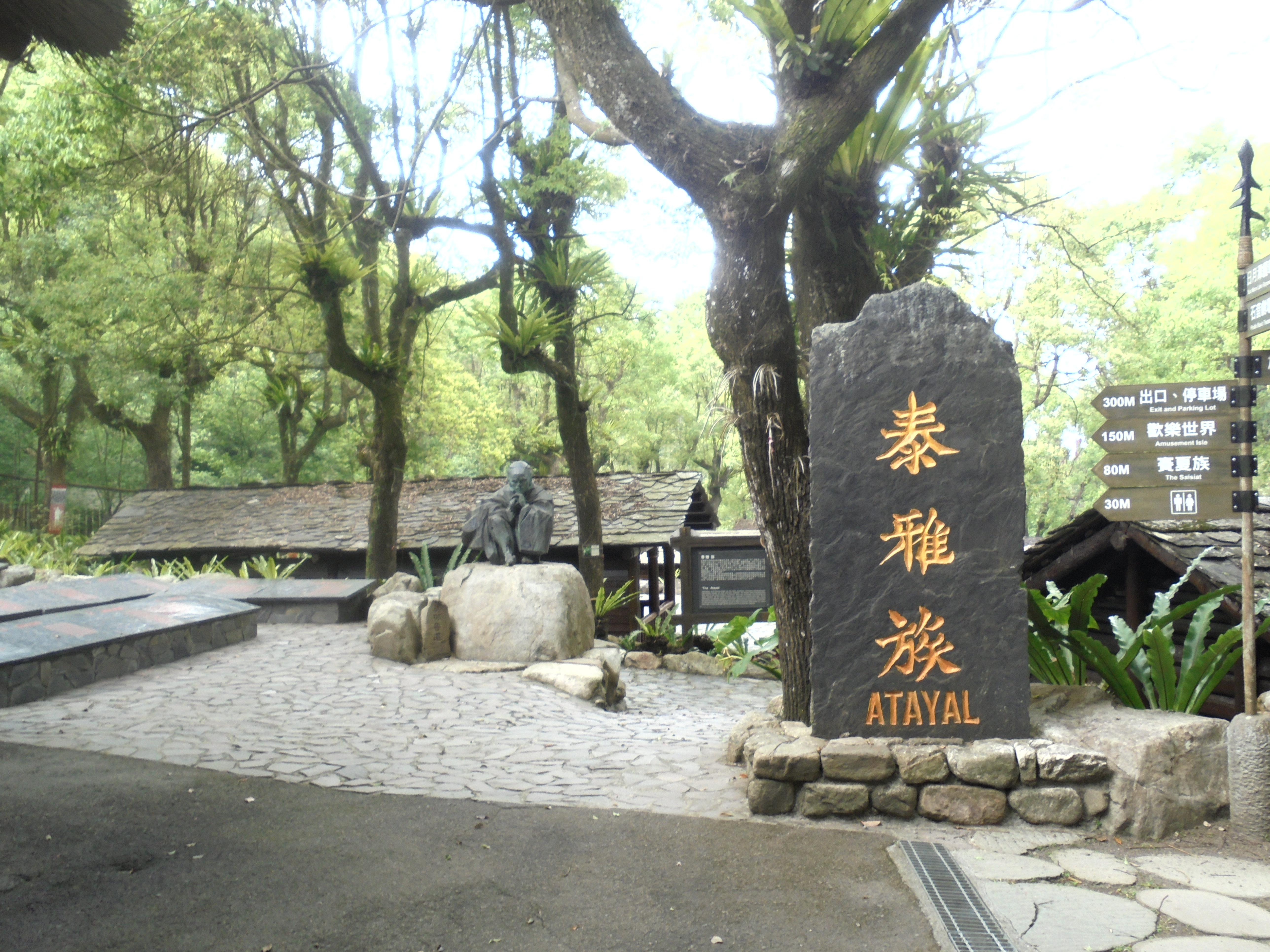 中文（台灣）: 九族文化村泰雅族區石碑與莫那魯道雕像。